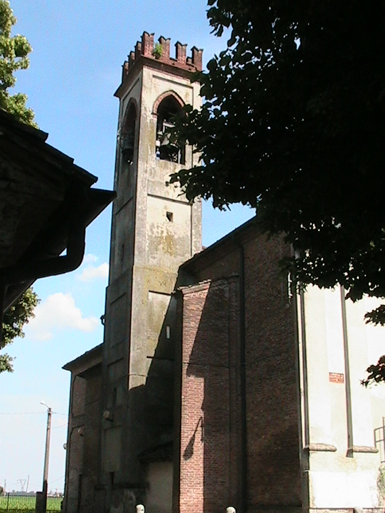 Chiesa di San Michele - Malagnino